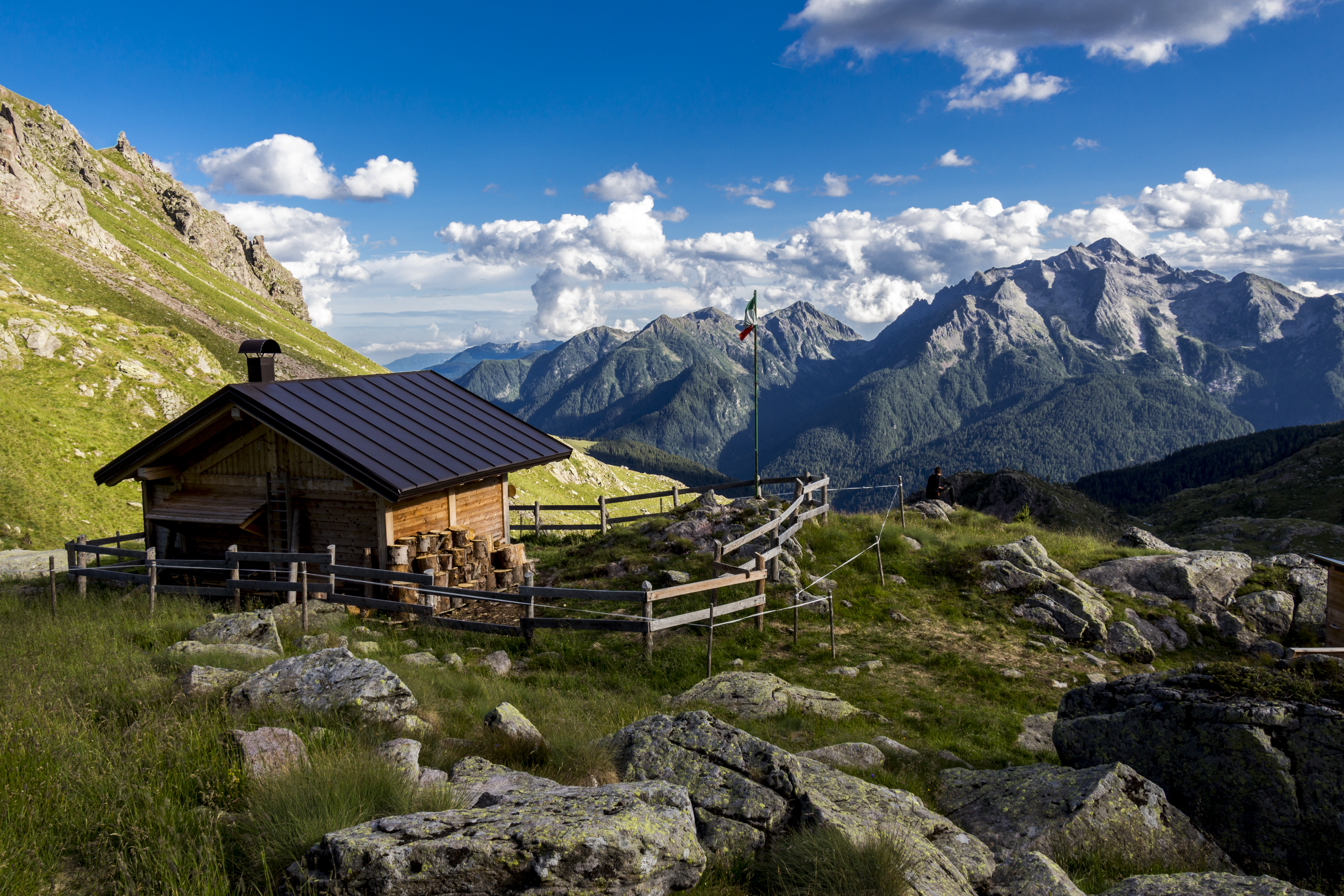 Lagorai (Q47493713)